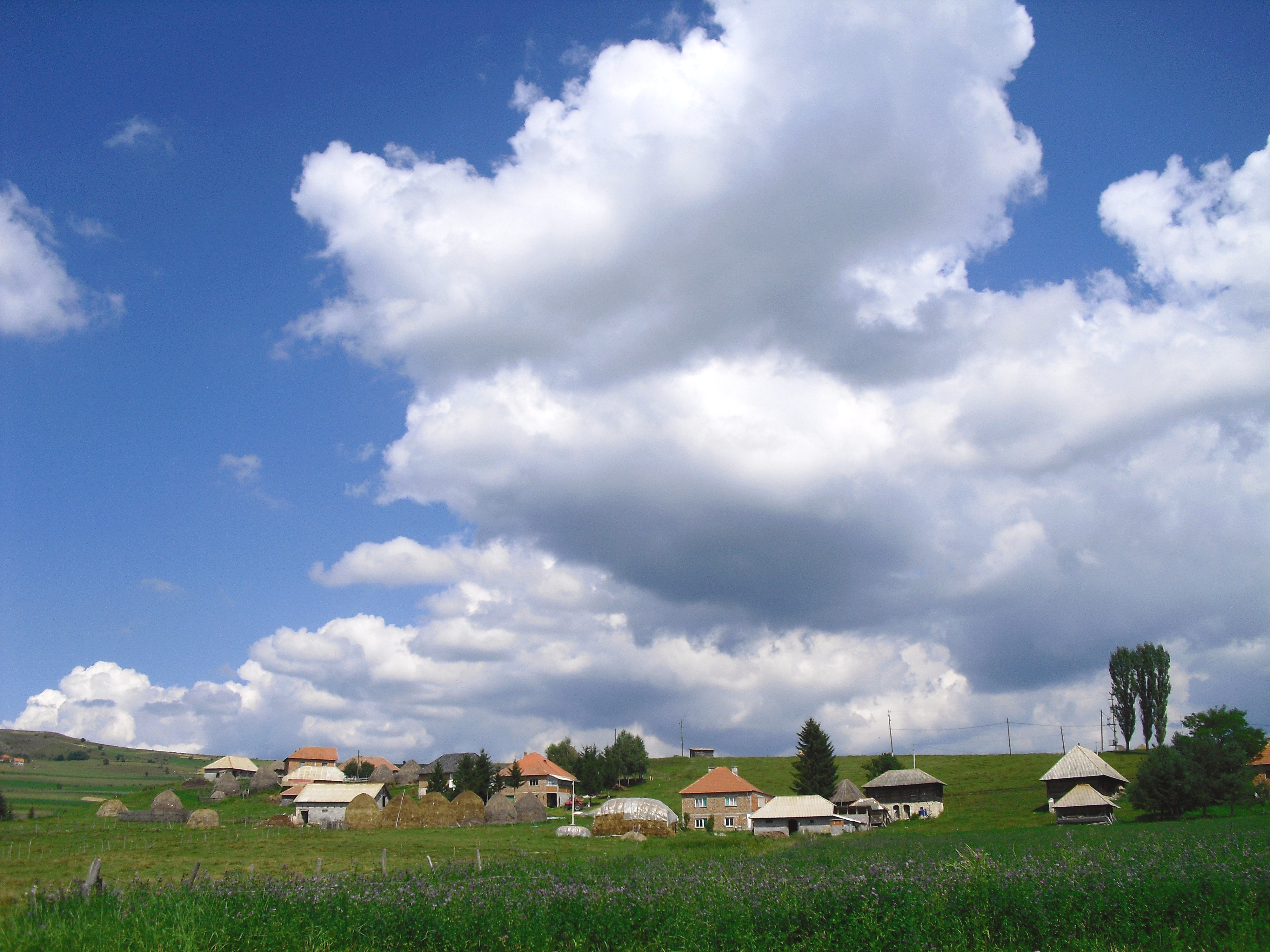 Весковиће,Штаваљ,Сјеница,Србија...